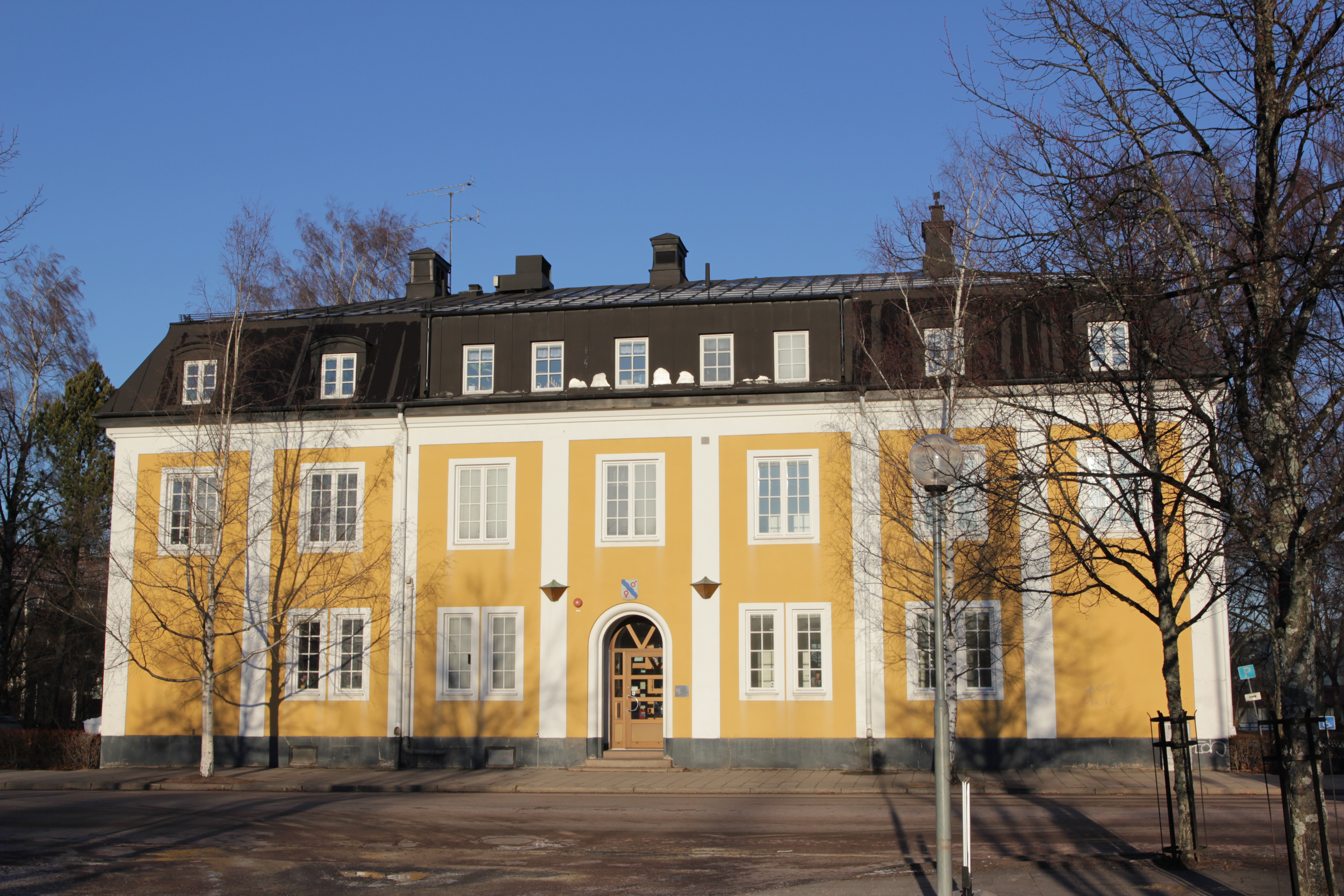 Avesta kommunhus, Avesta, Sverige